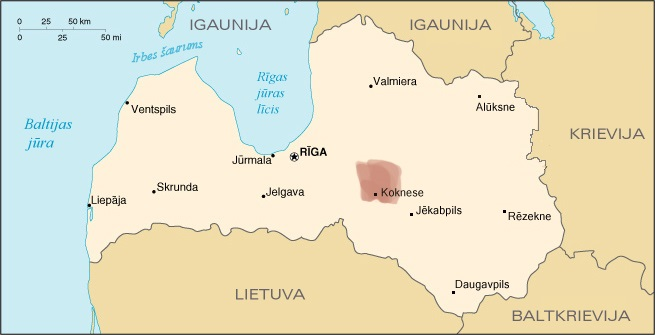 Kokneses valsts teritorijas variācijas pēc dažādām vēstures kartēm.